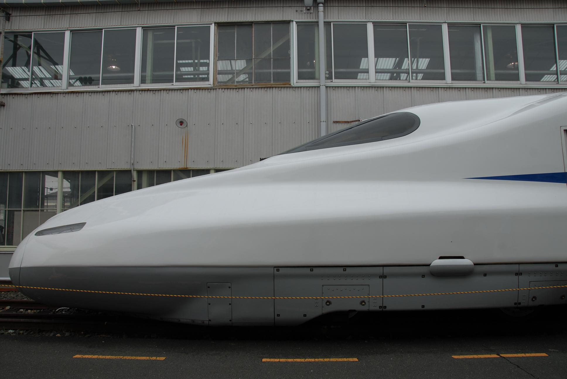 新幹線N700系の先頭車（側面） 新幹線なるほど発見デーにて（2006年7月23日）